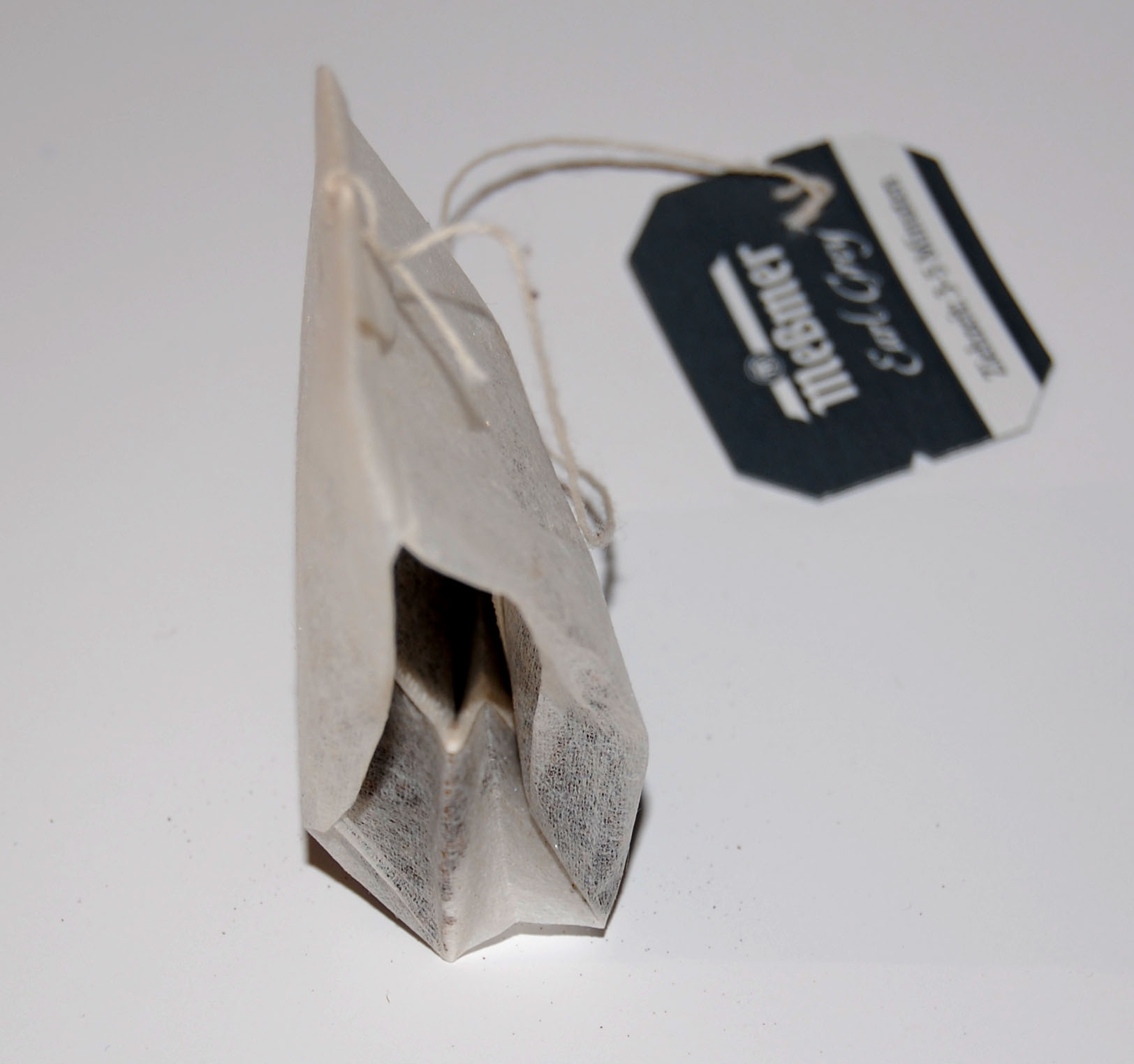 bagged Tea